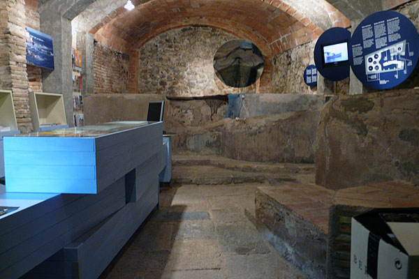 Vista general de Sa Perola